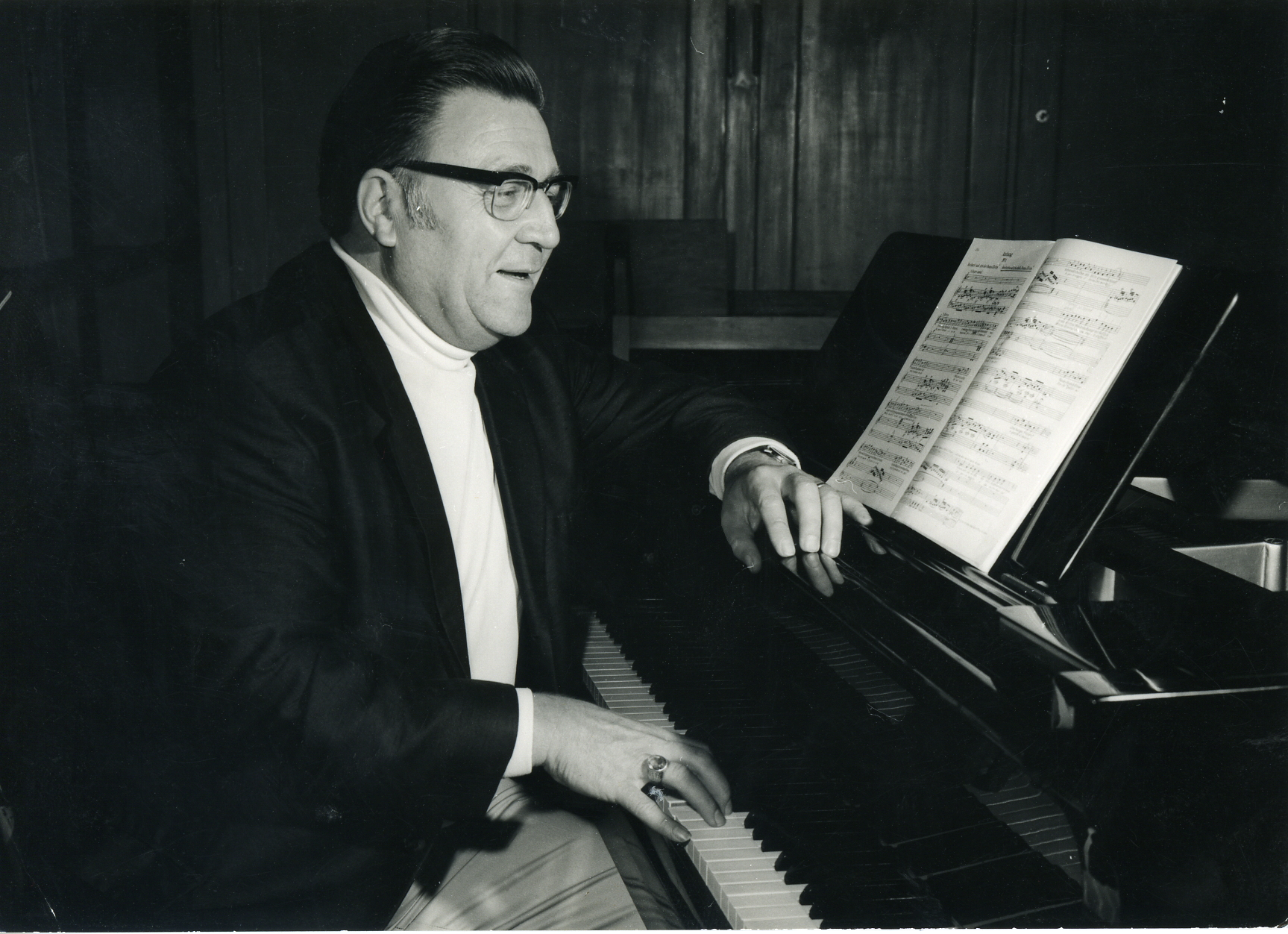 Walter Hesse beim Studium neuer Rollen